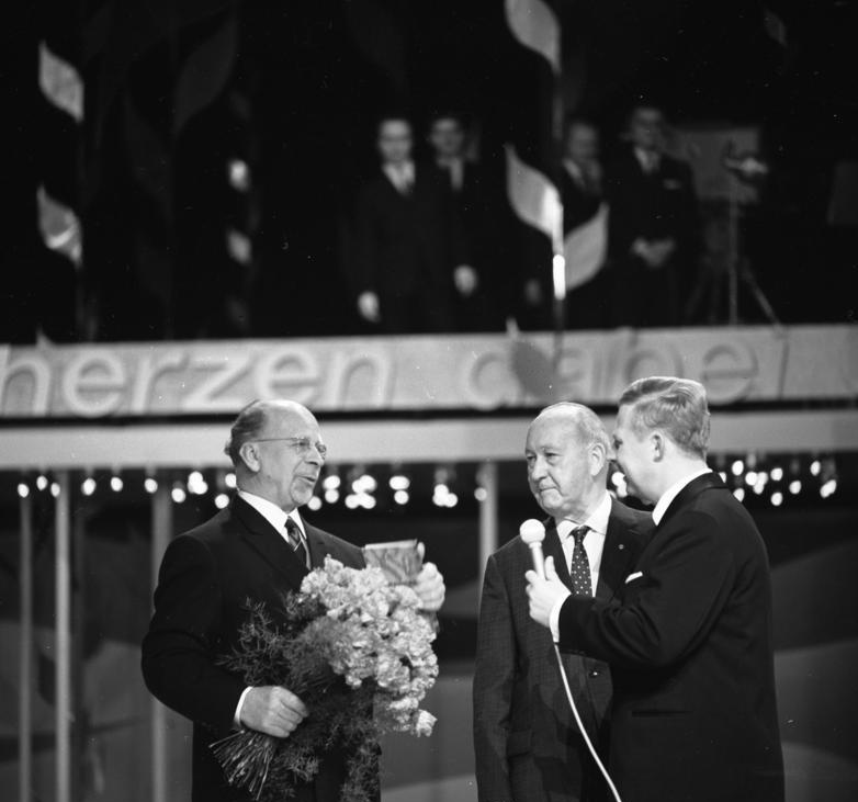 Berlin, Ulbricht und Max Fechner ZB/Spremberg 17.4.1966 Höhepunkt der Sendereihe "Mit dem Herzen dabei" war am 16.4.1966 das Erscheinen des Ersten Sekretärs des ZK und Vorsitzenden des Staatsrates,Walter Ulbricht, auf der Bühne des Friedrichstadt-Palastes, wo er mit dem Verdienten Arbeiterveteran und ehem. SED-Funktionär, Max Fechner, unter brausendem Beifall der über 3000 begeisterten Zuschauer ein Gespräch führte. Rechts im Bild der Leiter der Sendereihe Hans-Georg Ponesky. Abgebildete Personen: Fechner, Max: Justizminister, DDR Ulbricht, Walter: Staatsratsvorsitzender, Erster Sekretär des Zentralkomitees (ZK) der SED, Vorsitzender des Nationalen Verteidigungsrates, DDR Ponesky, Hans-Georg: Mitarbeiter des Deutschen Fernsehfunks, DDR